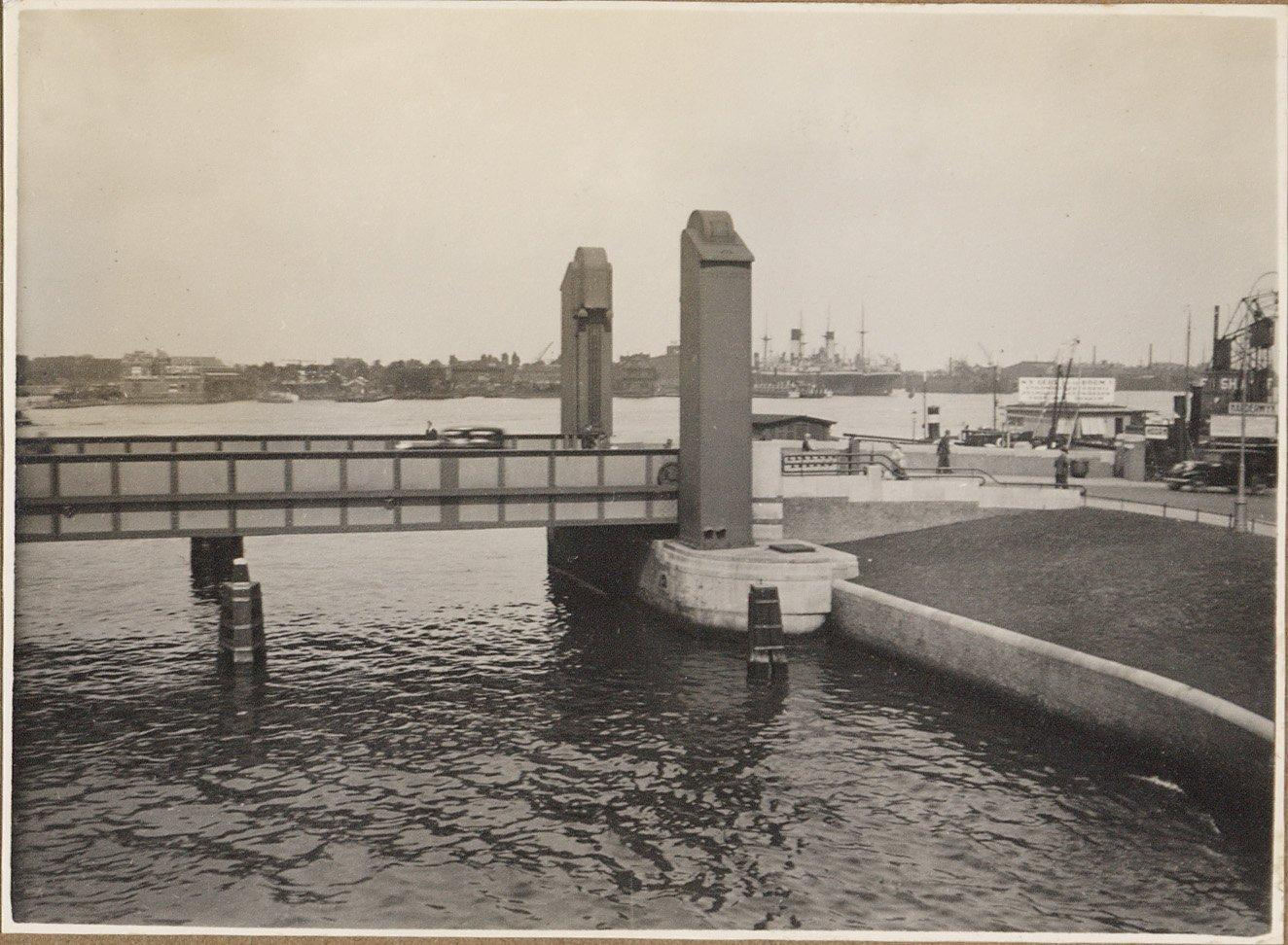 Beschrijving Hefbrug 276 over de Oostertoegang in de De Ruijterkade (ged.), gezien naar het IJ Documenttype foto Vervaardiger Onbekend Anoniem Collectie Collectie Stadsarchief Amsterdam: albums Datering 1930 ca. Geografische naam Afgesloten IJ Oostertoegang De Ruijterkade Inventarissen Afbeeldingsbestand B00000023921